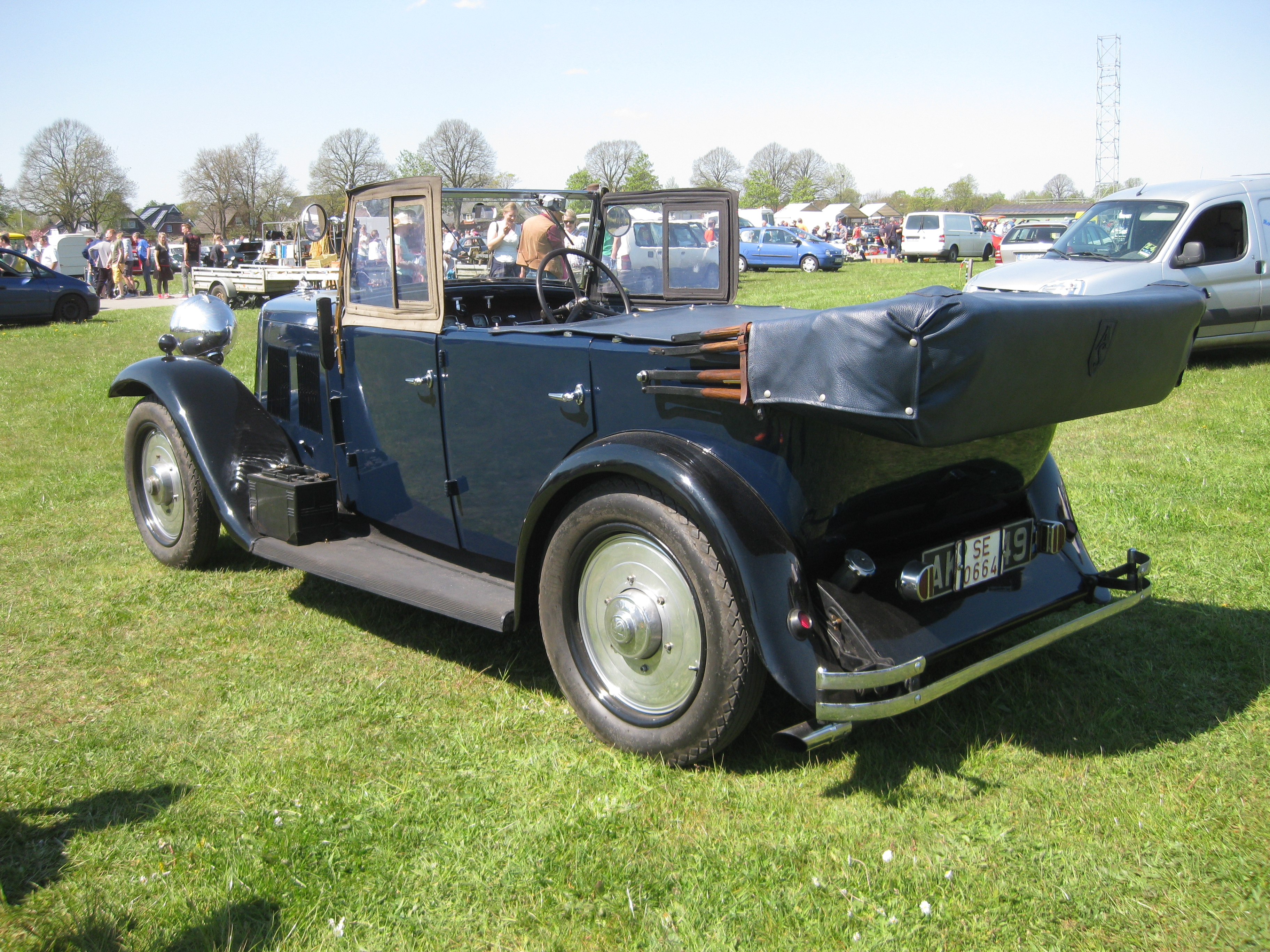 Armstrong Siddeley 4/14HP MK II Heck-/Seitenansicht